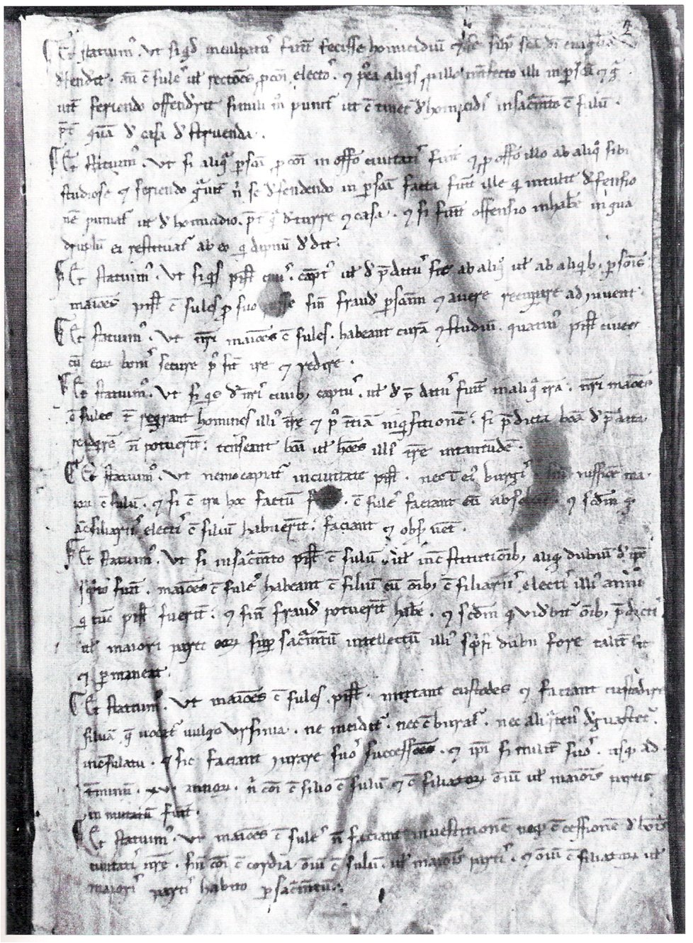 Statuto dei consoli del Comune di Pistoia del 1117, copia del 1775